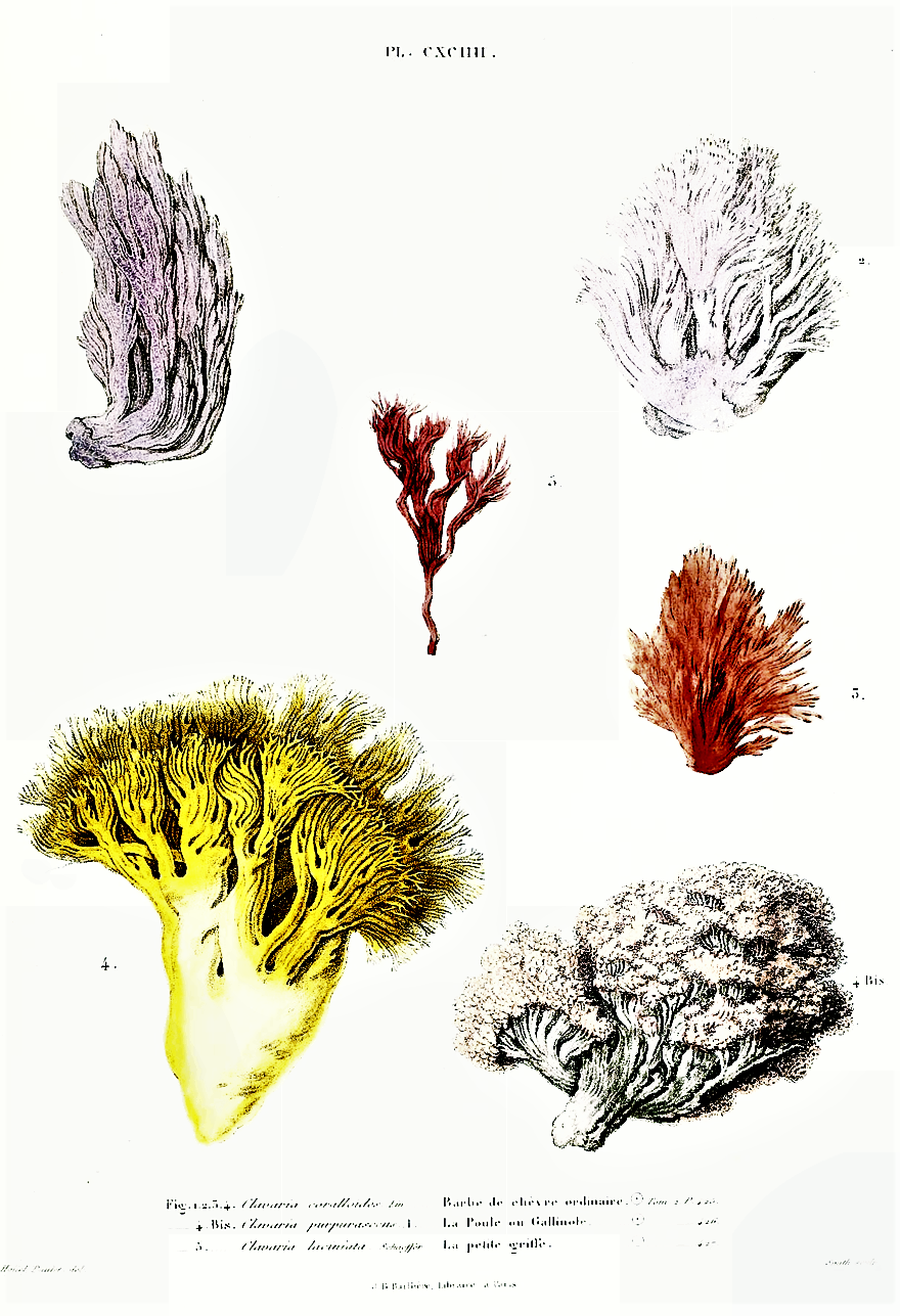 Jean-Jacques Paulet: Ramaria